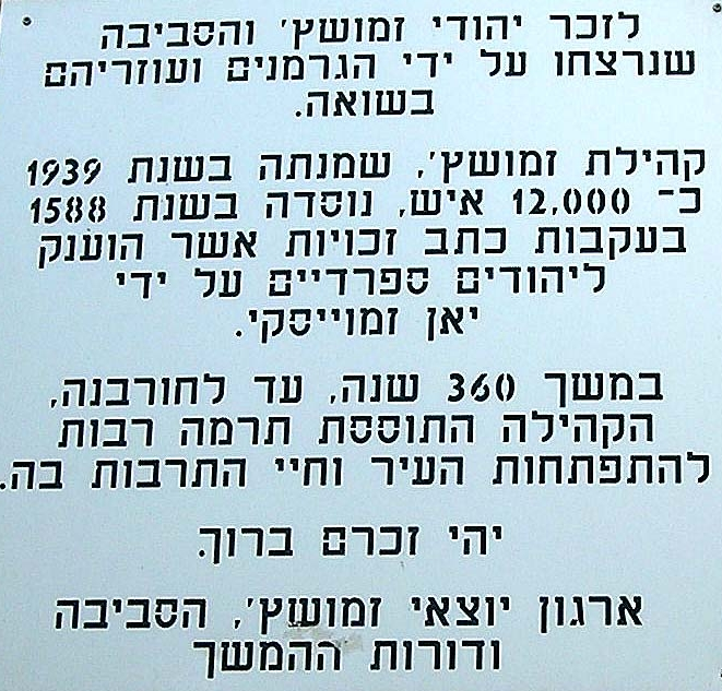 לוח זיכרון בעיר זמושץ'